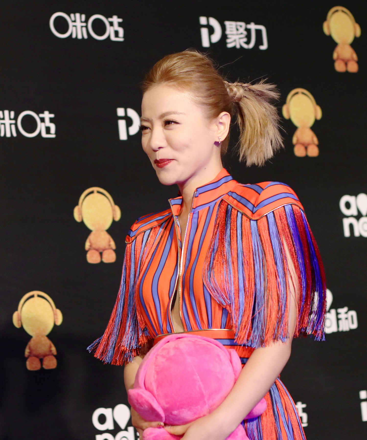 上海 咪咕颁奖礼红毯